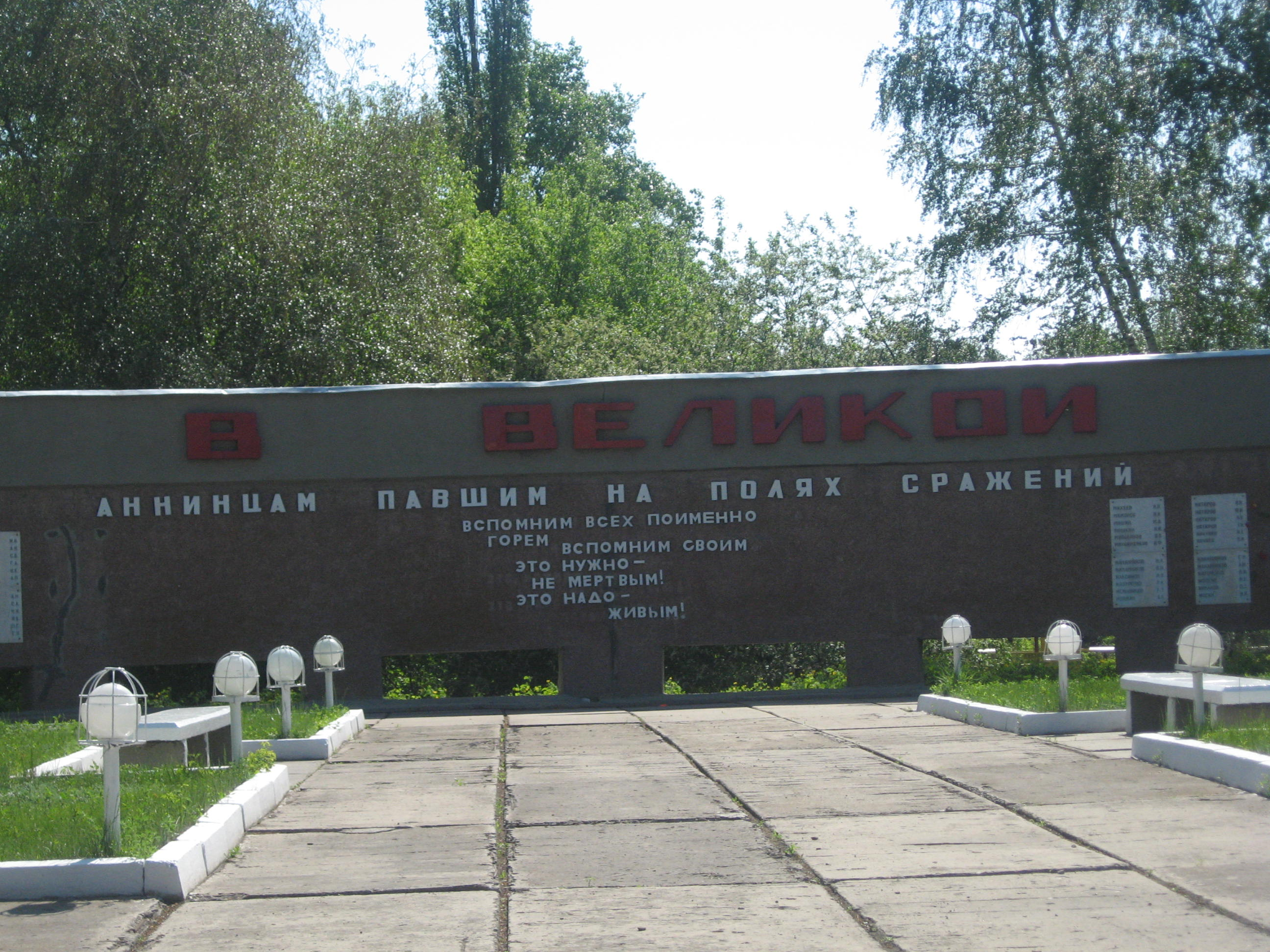 Template:Виден мемориал.